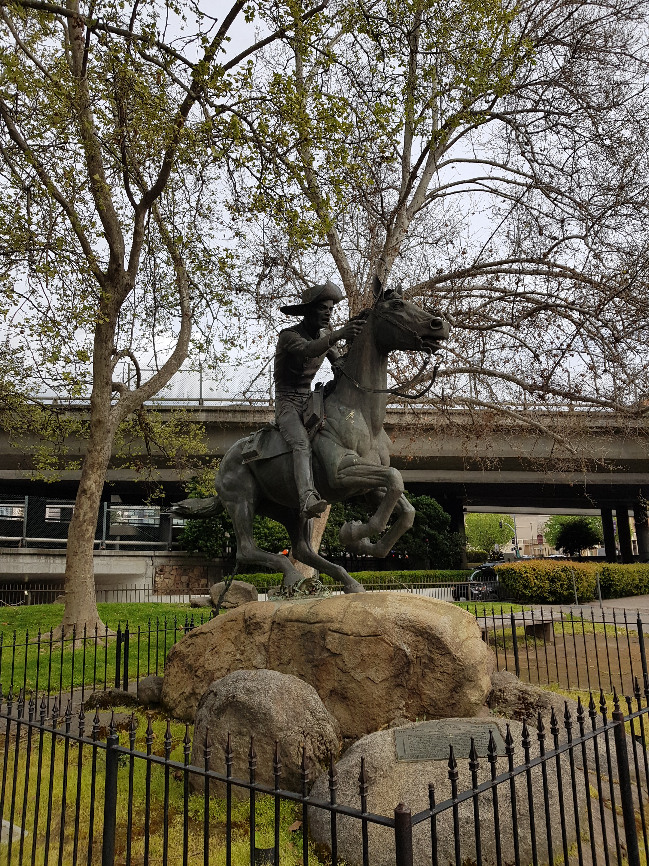 This is the Pony Express statue in Sacramento